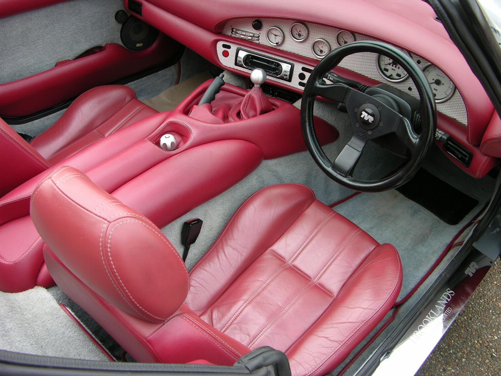 1997 TVR Chimaera 4.0